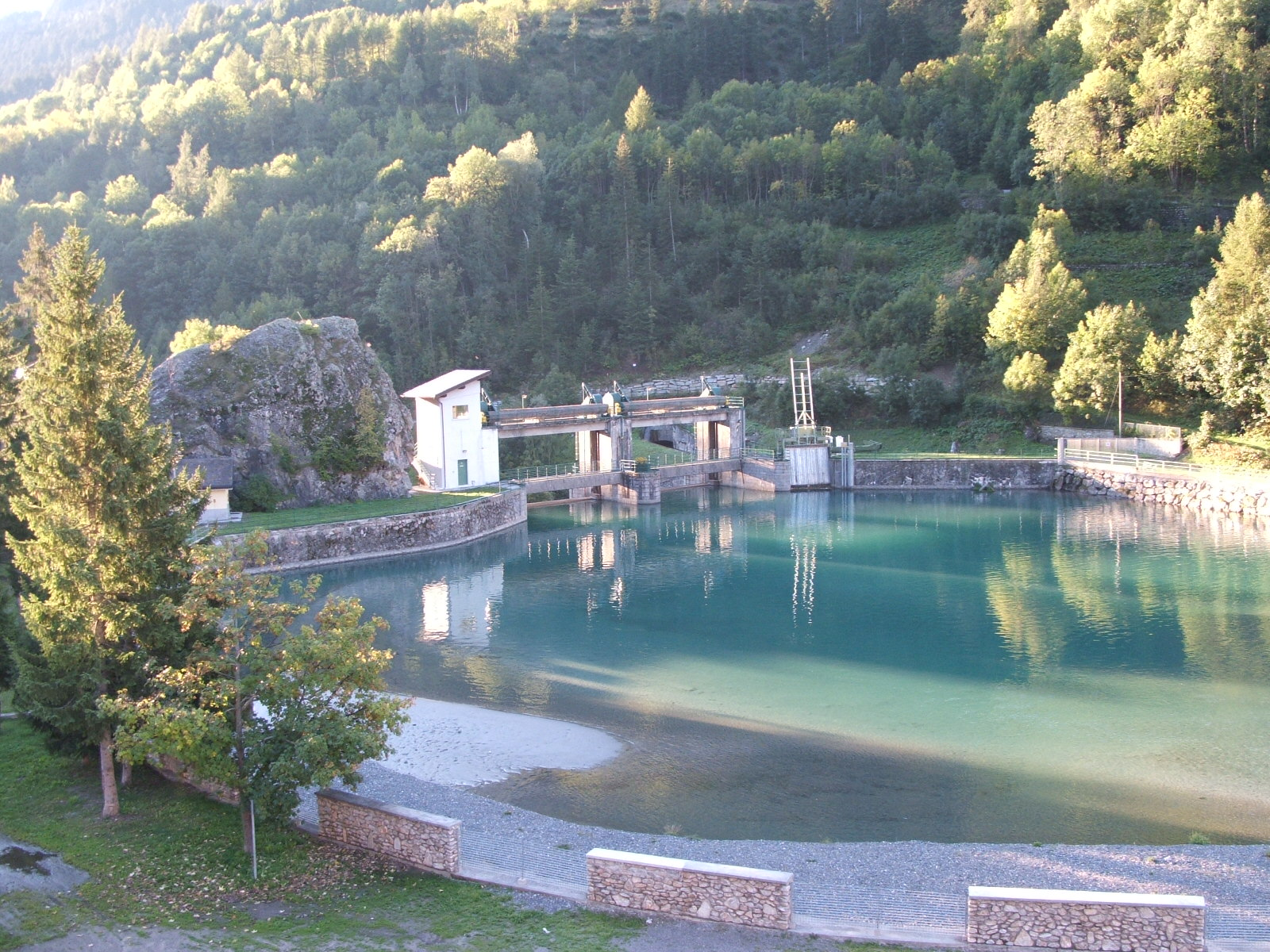 Immagine da Pietraporzio, valle Stura di Demonte, in provincia di Cuneo, Piemonte, Italia